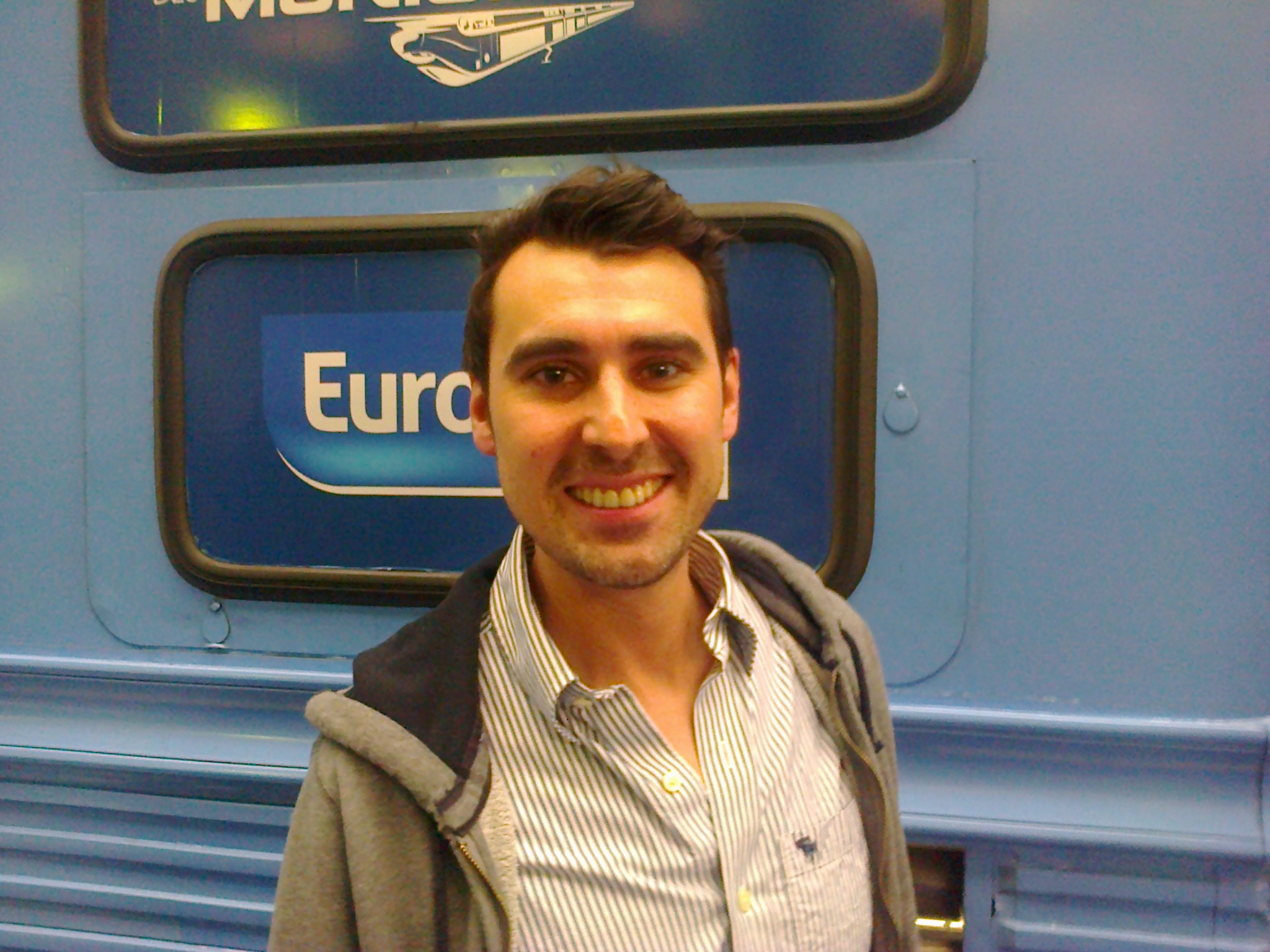 Thomas Joubert devant le train des Municipales Europe 1